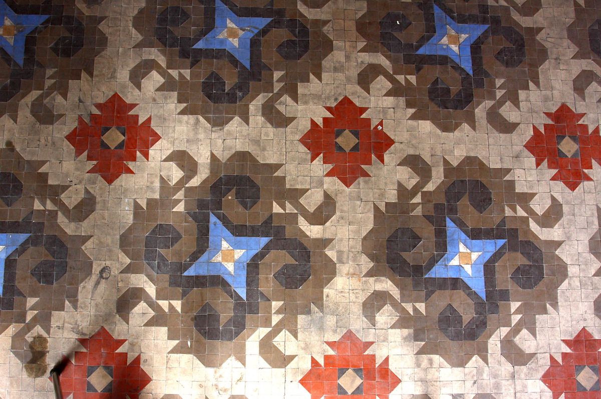 Casa Burés, obra modernista de Francesc Berenguer i Mestres Construïda entre 1900-1905. Rajola hidràulica.